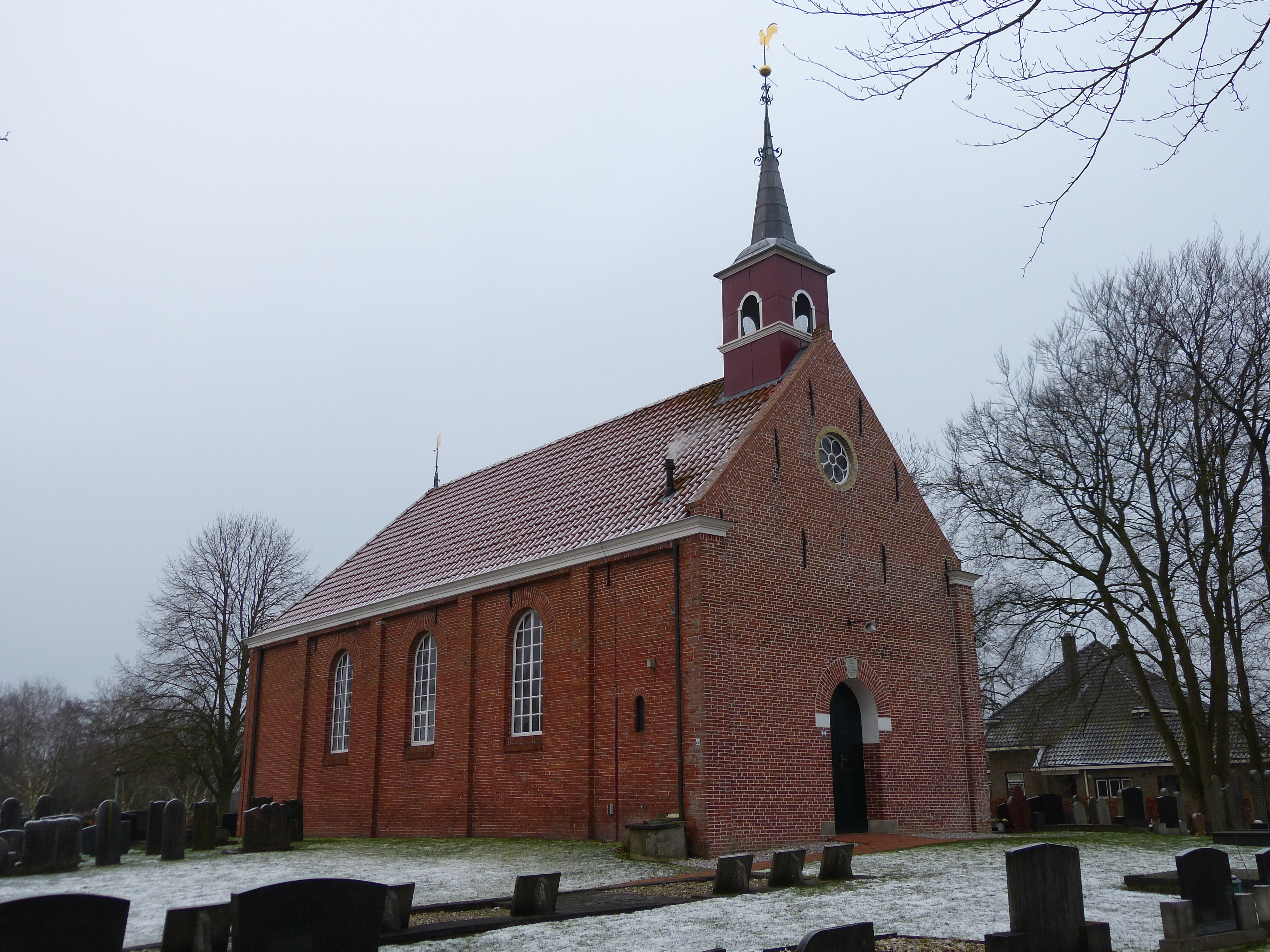 Sebaldeburen kerk Provincialeweg 44